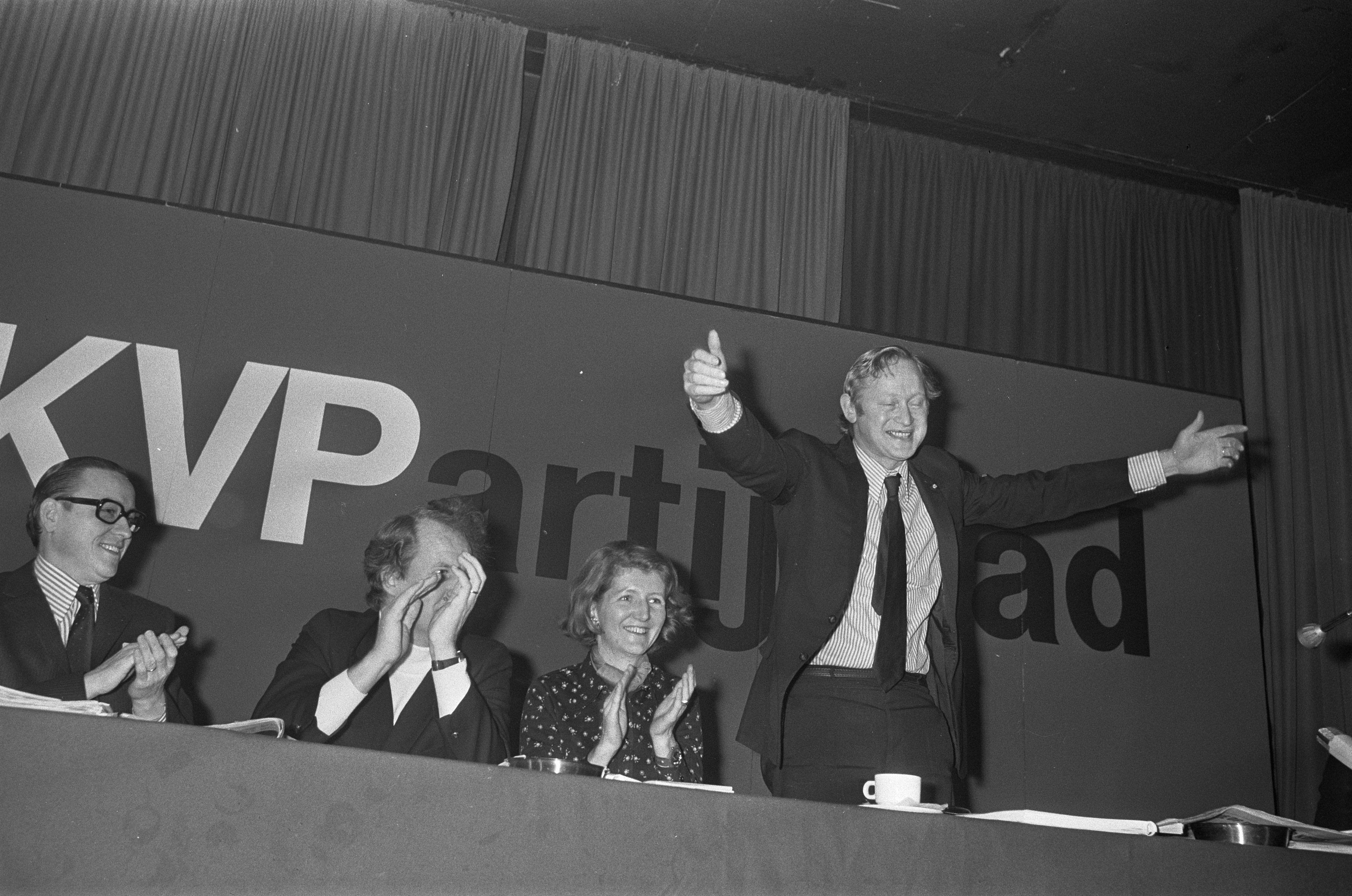 Collectie / Archief : Fotocollectie Anefo Reportage / Serie : [ onbekend ] Beschrijving : KVP-partijraad in Oisterwijk, Andriessen bedankt voor applaus Datum : 2 december 1972 Locatie : Noord-Brabant, Oisterwijk Trefwoorden : conferenties, politiek Persoonsnaam : Andriessen, Frans Fotograaf : Punt, […] / Anefo Auteursrechthebbende : Nationaal Archief Materiaalsoort : Negatief (zwart/wit) Nummer archiefinventaris : bekijk toegang 2.24.01.05 Bestanddeelnummer : 926-0712